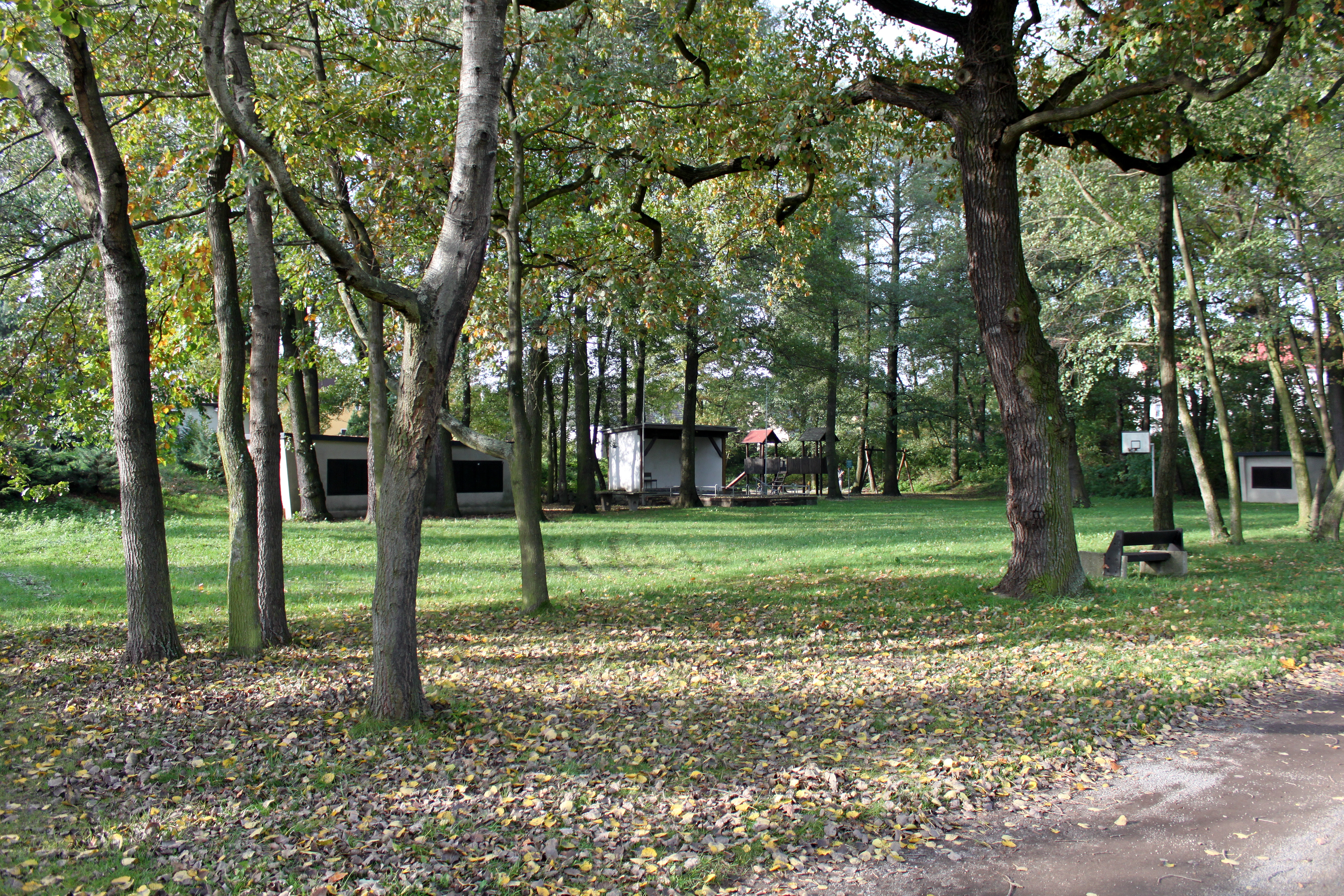 Spiel- und Sportplatz mit kleiner Freilichtbühne in Prieschka